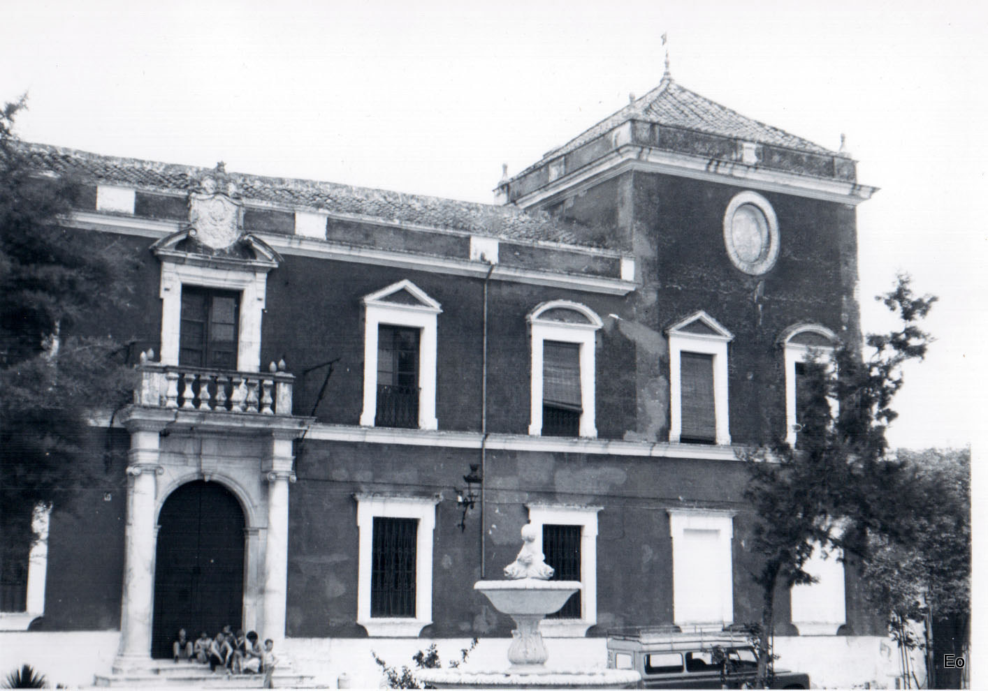 Palacio Ducal de Fernán Núñez